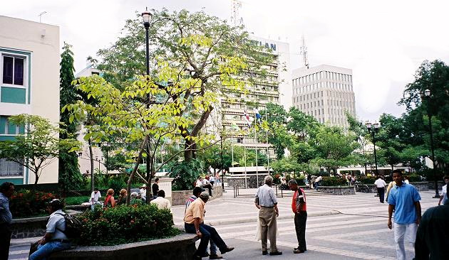 People on Central Plaza. San Pedro Sula, Honduras